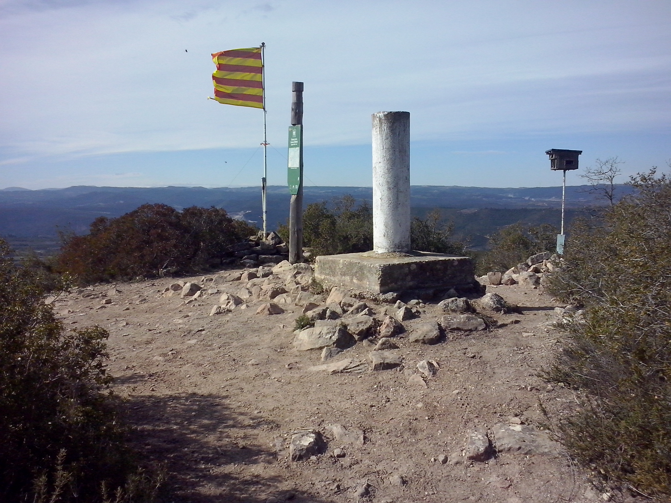 Vista del cim del Puig de Sant Miquel amb el seu vèrtex geodèsic